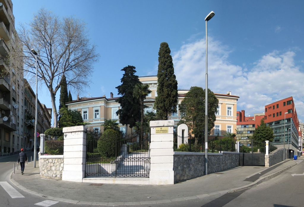 Riječka nadbiskupija u Rijeci.